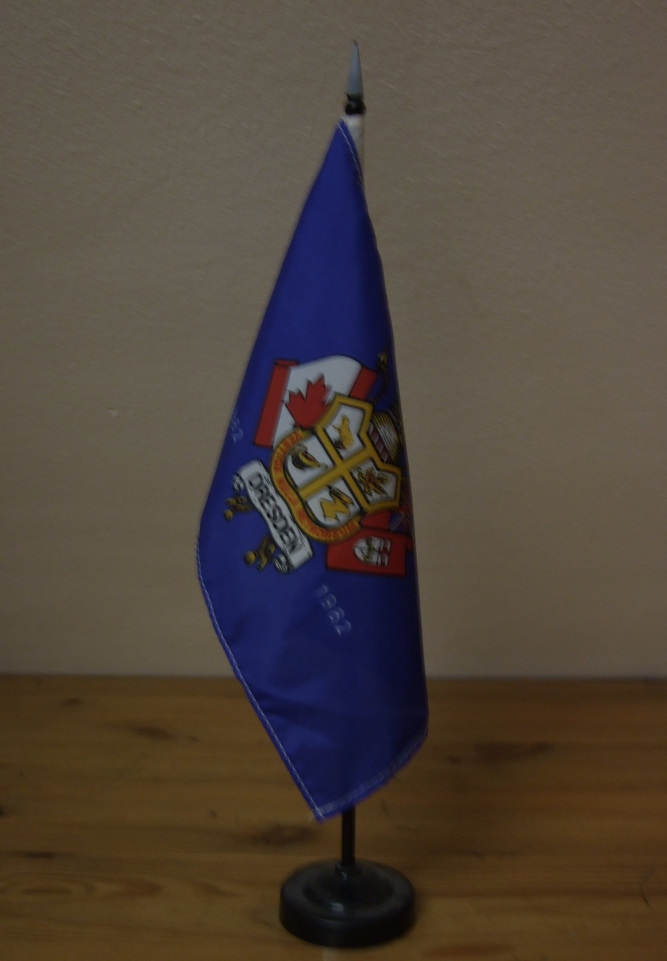 Wimpel aus Dresden, Ontario (1882 - 1982)